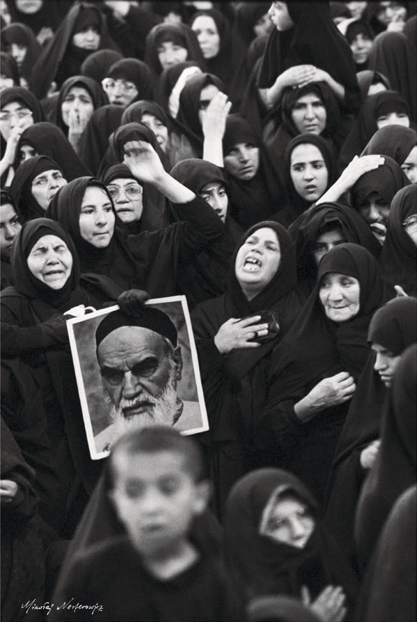 1992, Teheran. Kobiety uczestniczące w uroczystych obchodach rocznicy śmierci Ajatollaha Chomejniego. Fotografia z cyklu "Kobiety Świata”. Fot. Mikołolaj Nesterowicz